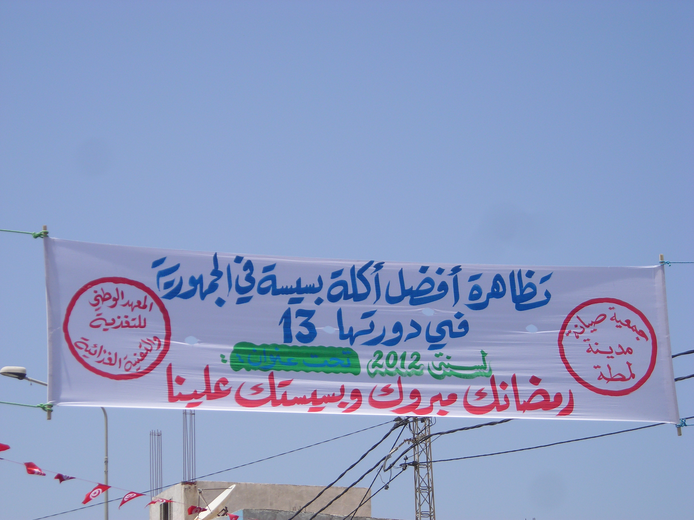 Festival de la Bsissa à Lamta